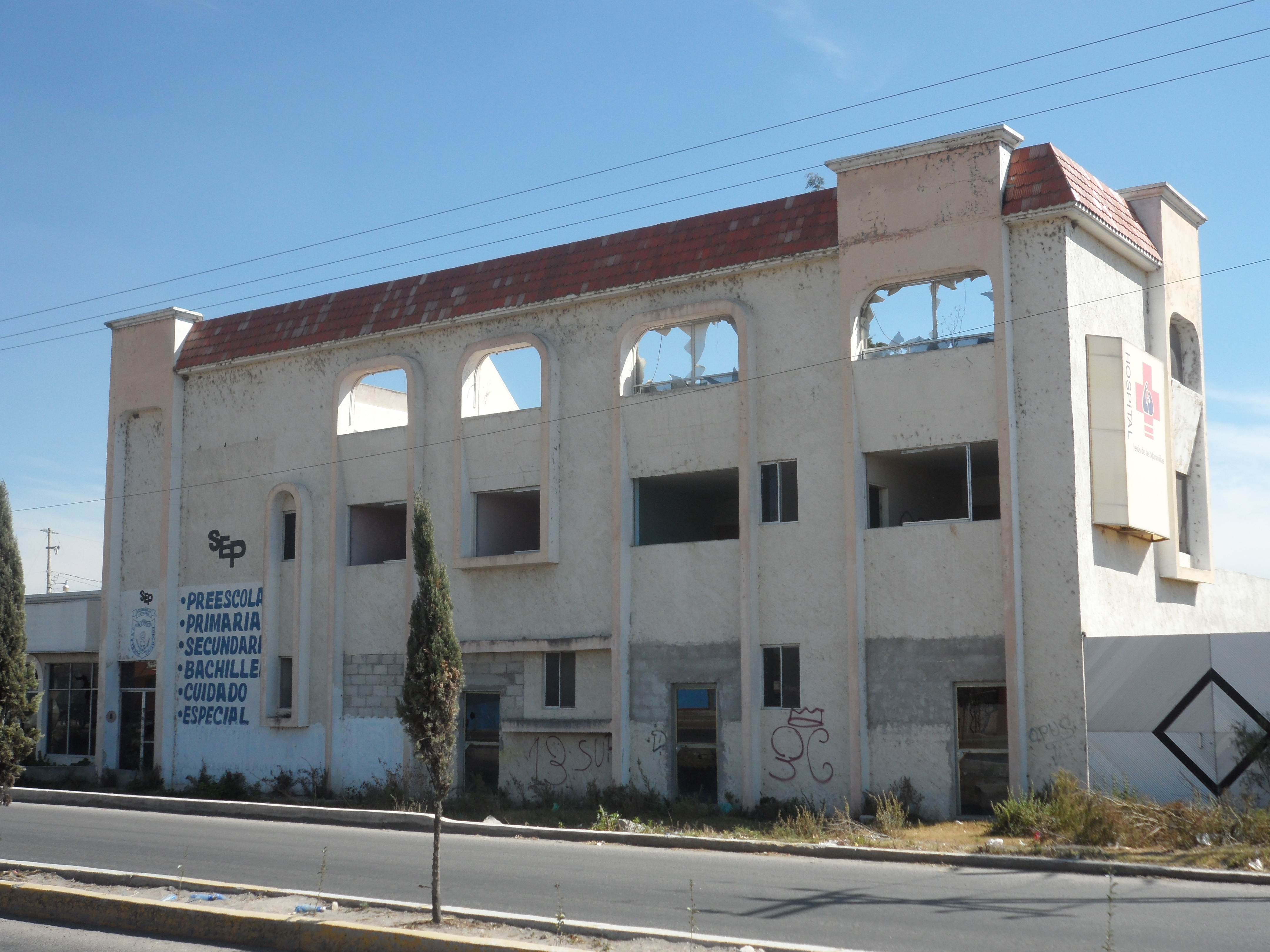 Antiguo hospital de la población de Palmarito Tochapán.